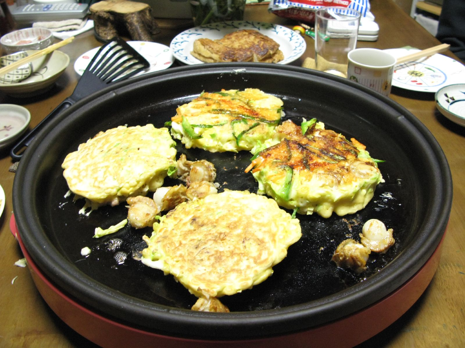 At Kumi's house.